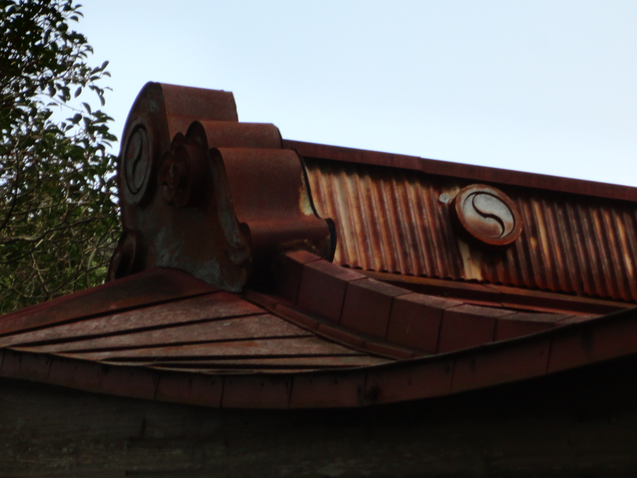 静岡県掛川市にある高室神社の屋根